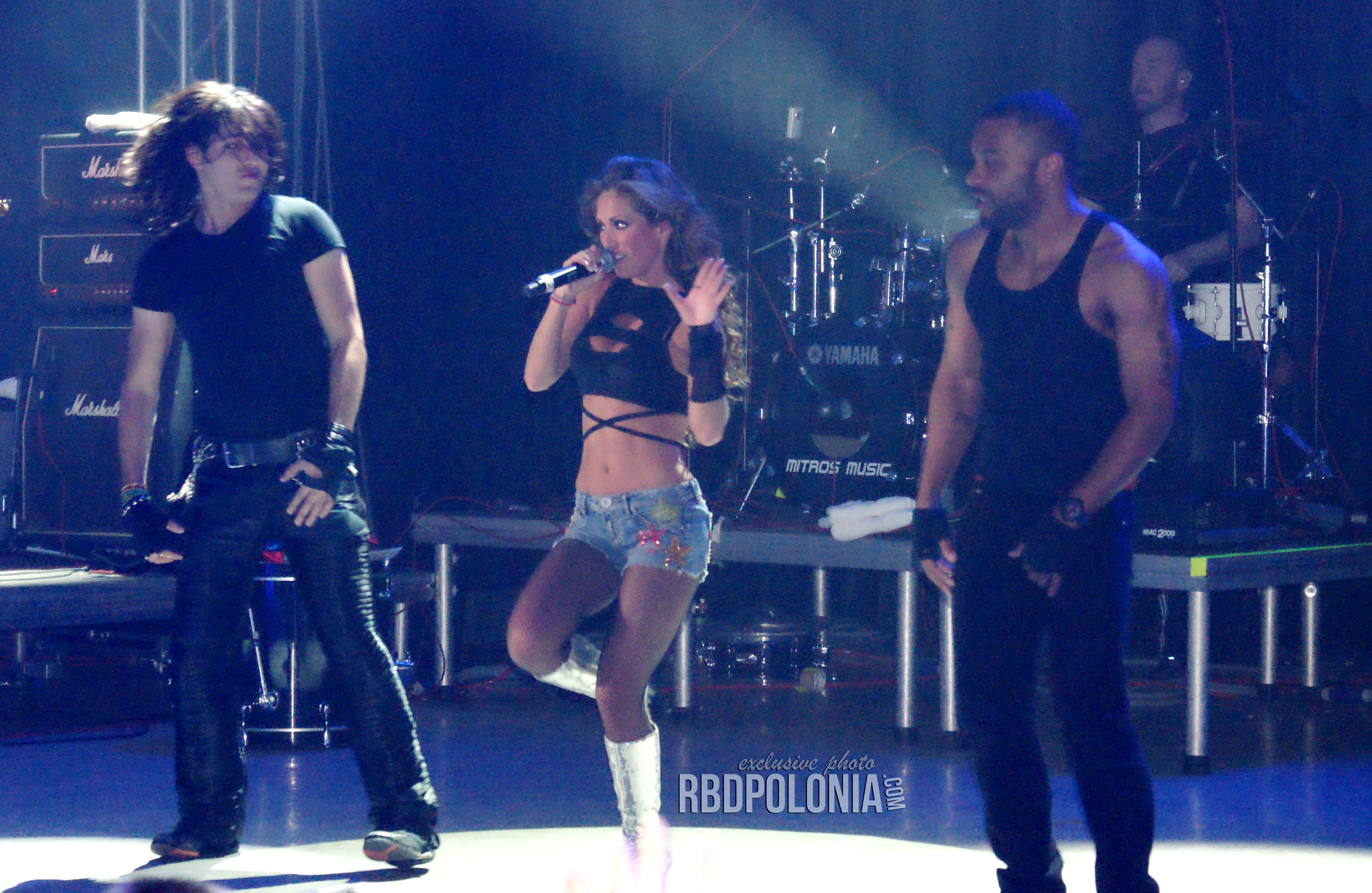 Anahí durante su gira Mi Delirio World Tour en Serbia, 10 de marzo de 2010.